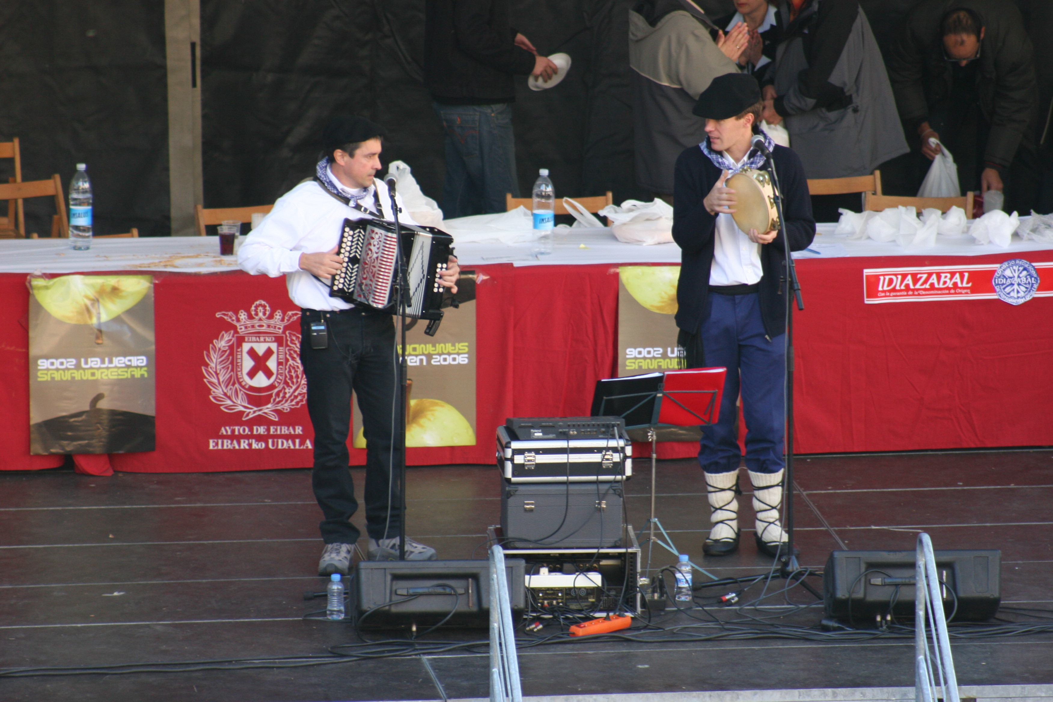 Jainaga eta Narbaiza trikitilariak.